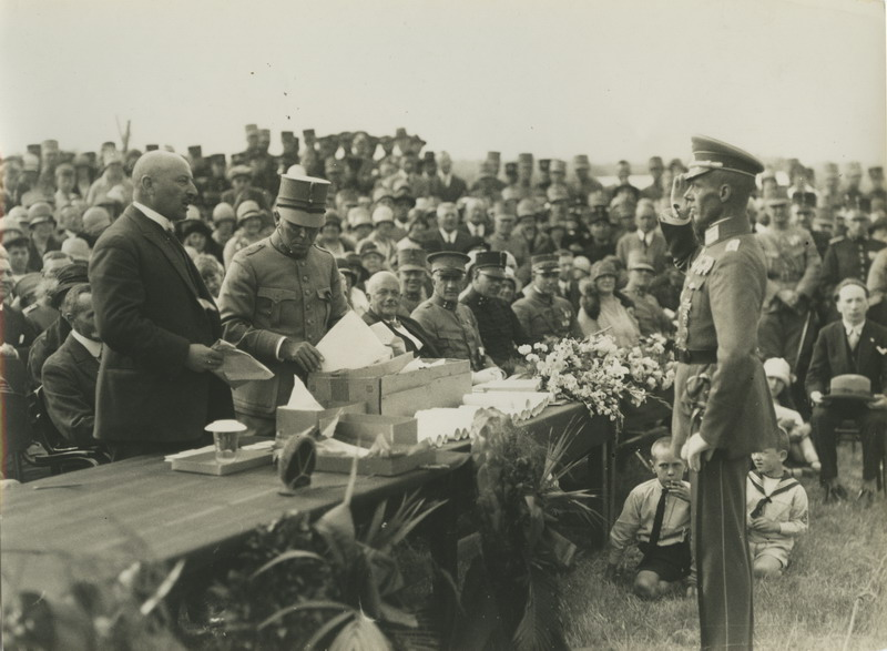 Aan het einde van de 18e vierdaagse neemt Hauptmann Ottenbacher de vierdaagse-kruisen in ontvangst.